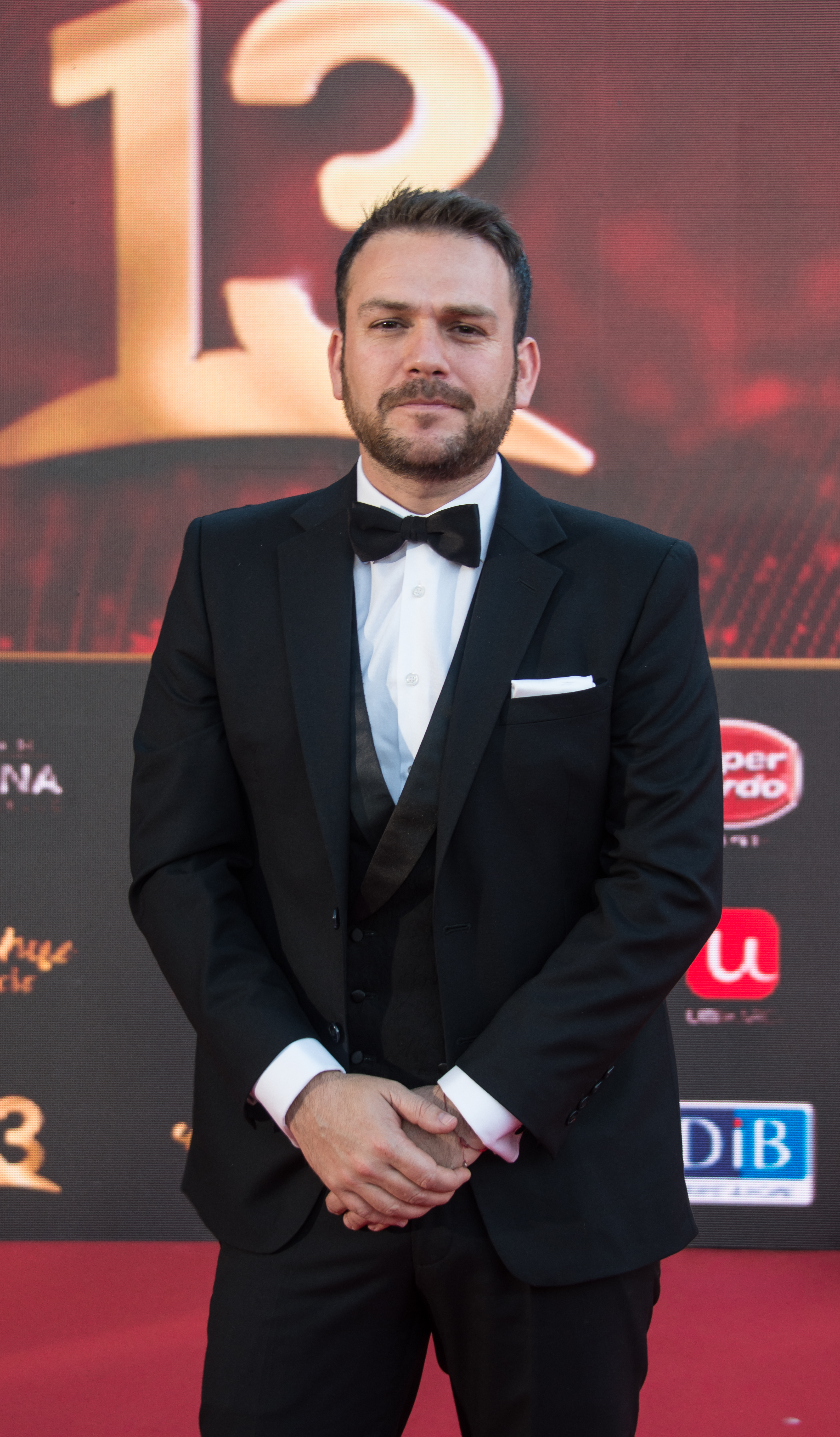 Ignacio Valenzuela, Copihue de Oro 2018, Sun Monticello, Mostazal, Región de O'Higgins, Chile